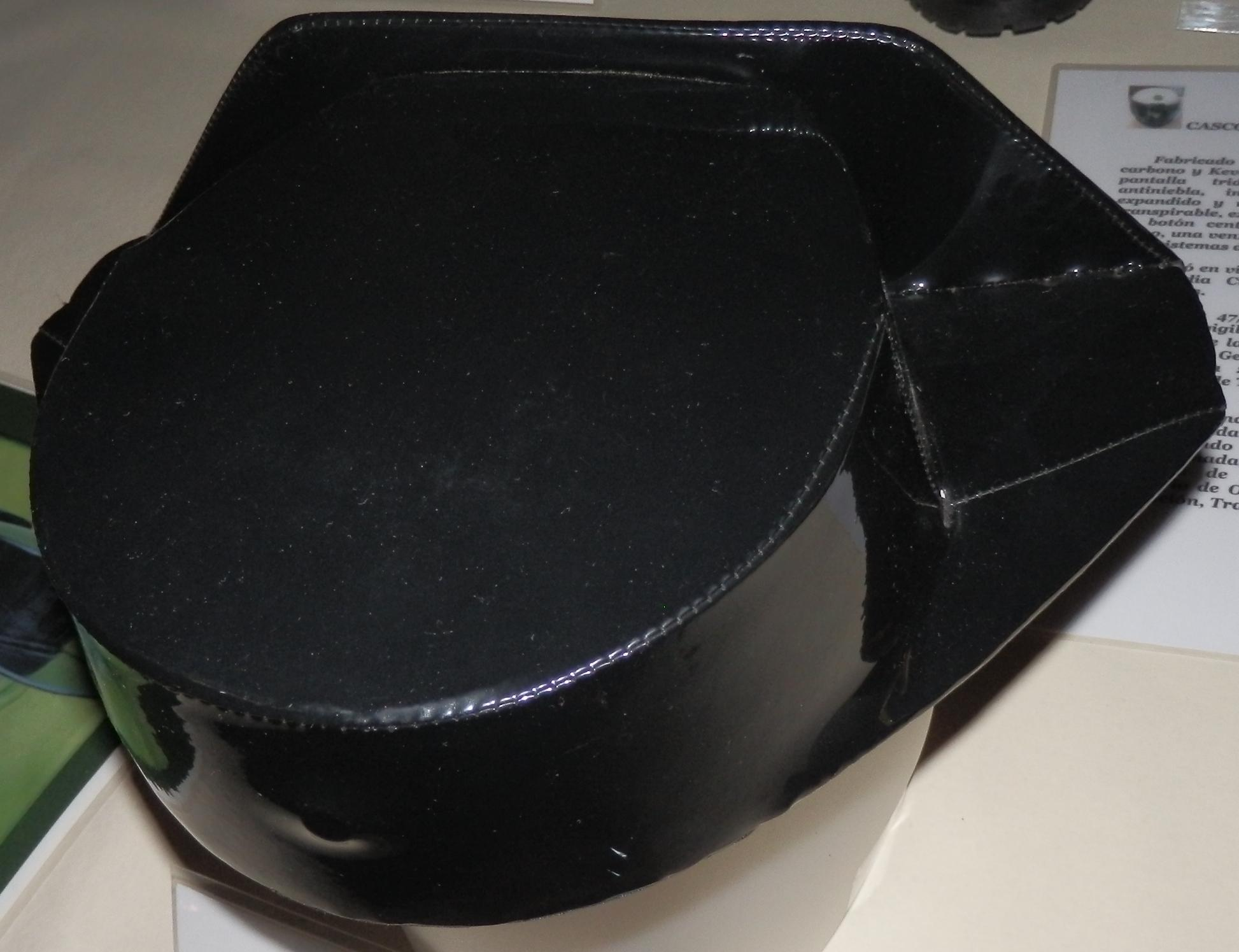 Tricornio usado por la Guardia Civil española.